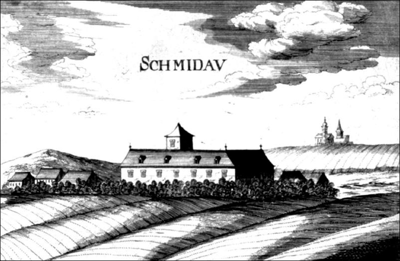 Schloss Schmida